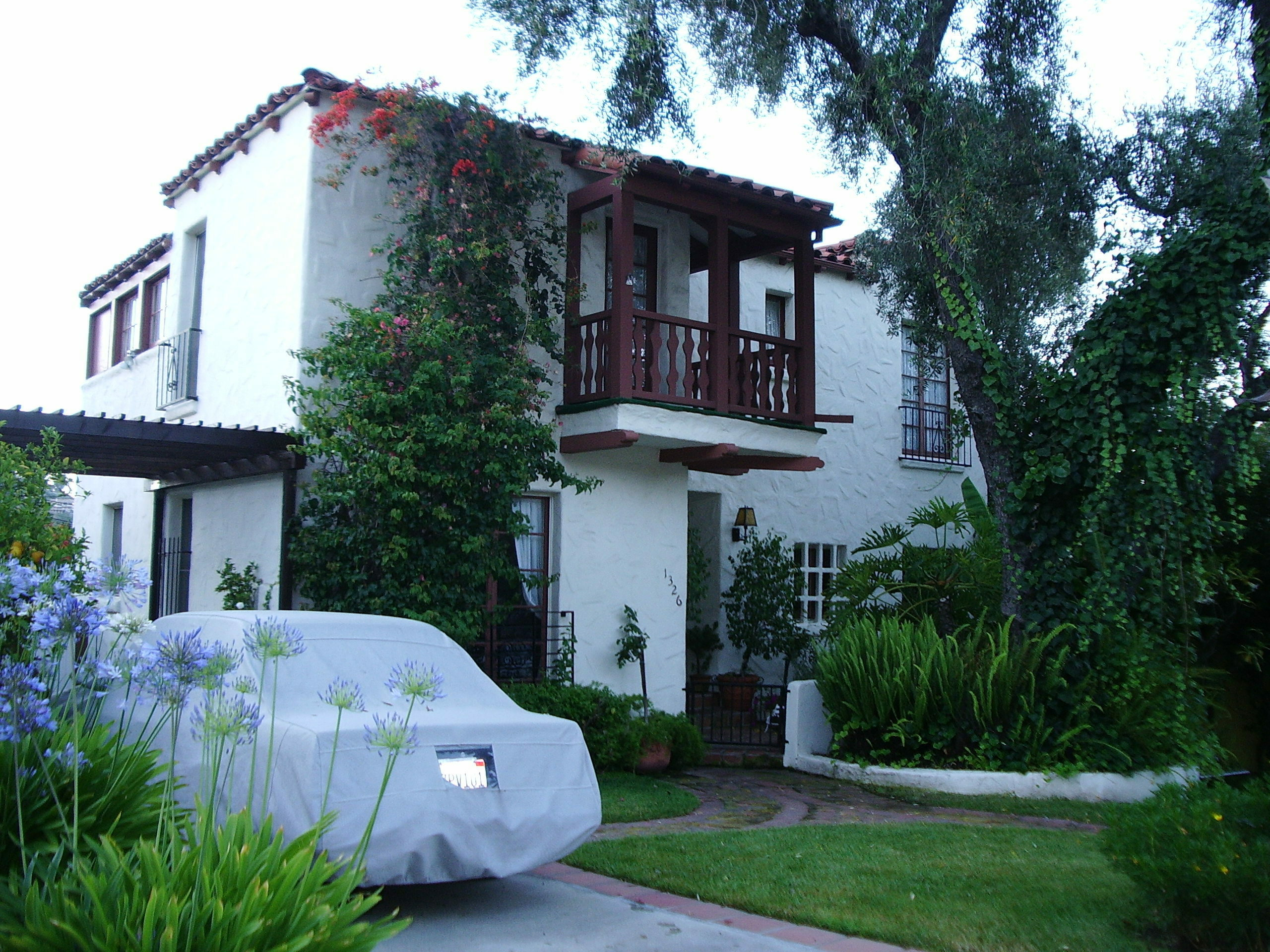 La Casa de Peterson con su restaurada pergola -- Historica en la ciudad de Glendale, California.